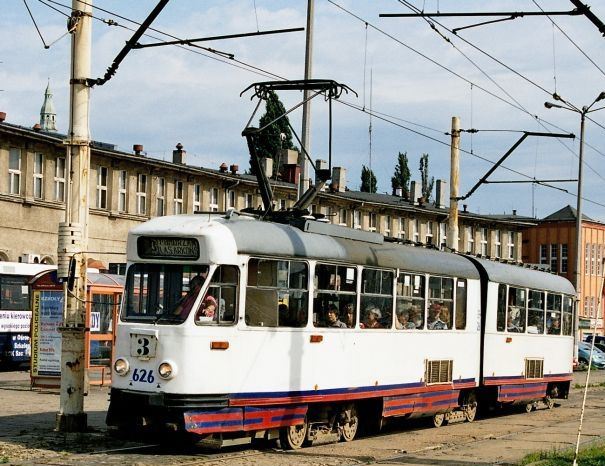 Zelf geschoten dia. Szczecin trams Types Numbers Lines Konstal 102Na 626 3